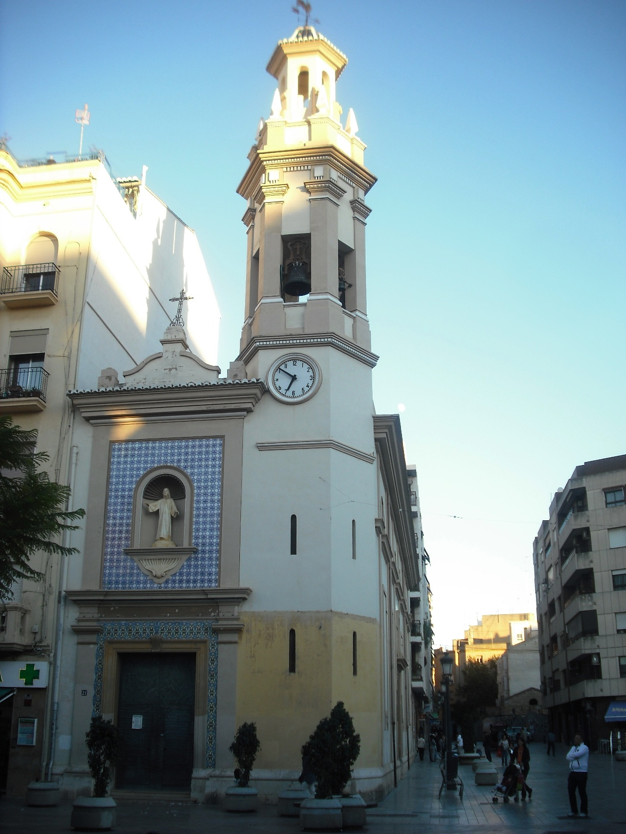 Església de Sant Isidre Llaurador de Patraix, València.